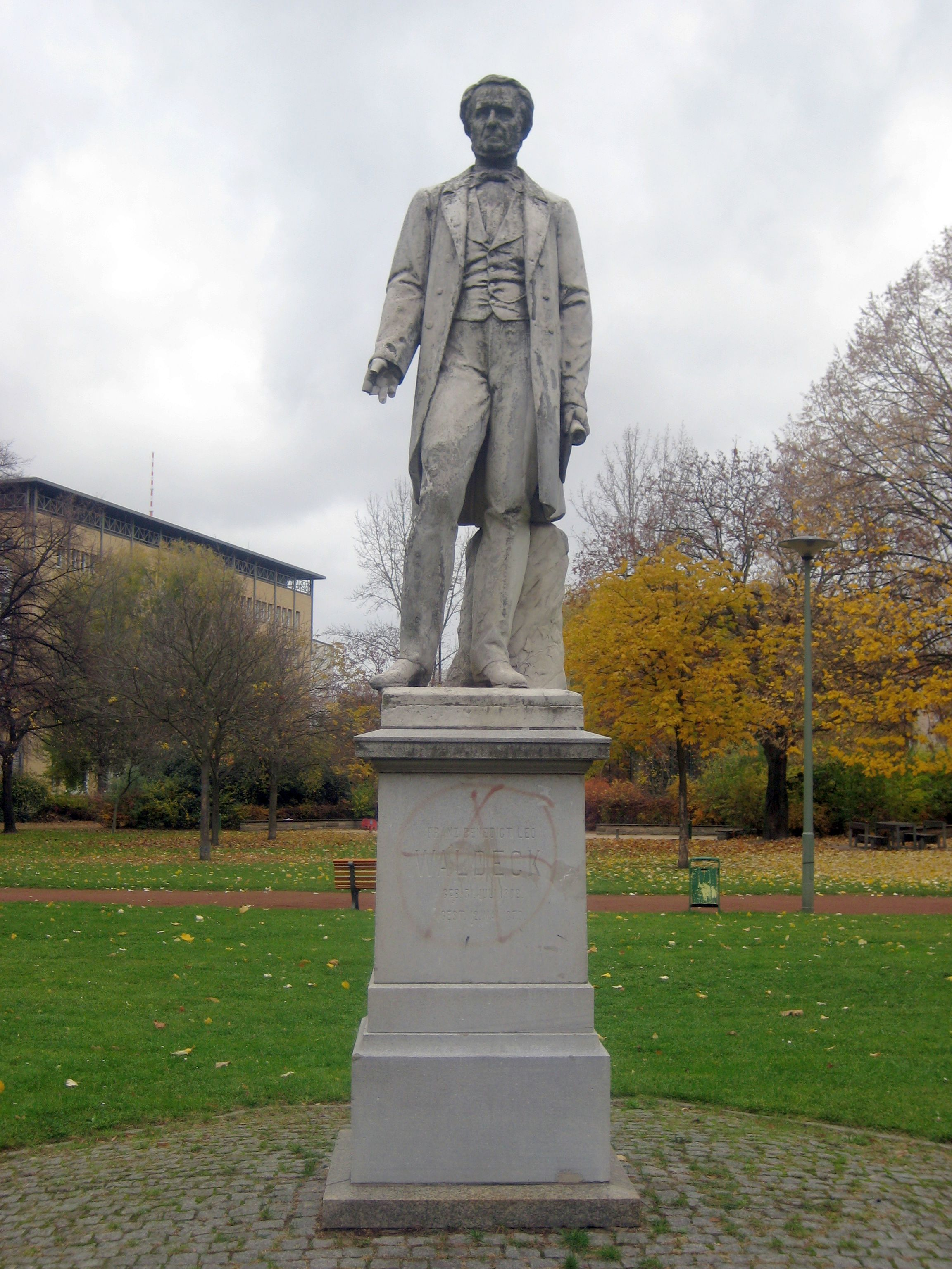 Denkmal für Franz Leo Benedikt Waldeck, Statue von Heinrick Walger (1889) im Waldeckpark in Berlin-Kreuzberg/Memorial for Franz Leo Benedikt Waldeck, statue by Heinrich Walger (1889) in the Waldeck Park in Berlin-Kreuzberg.